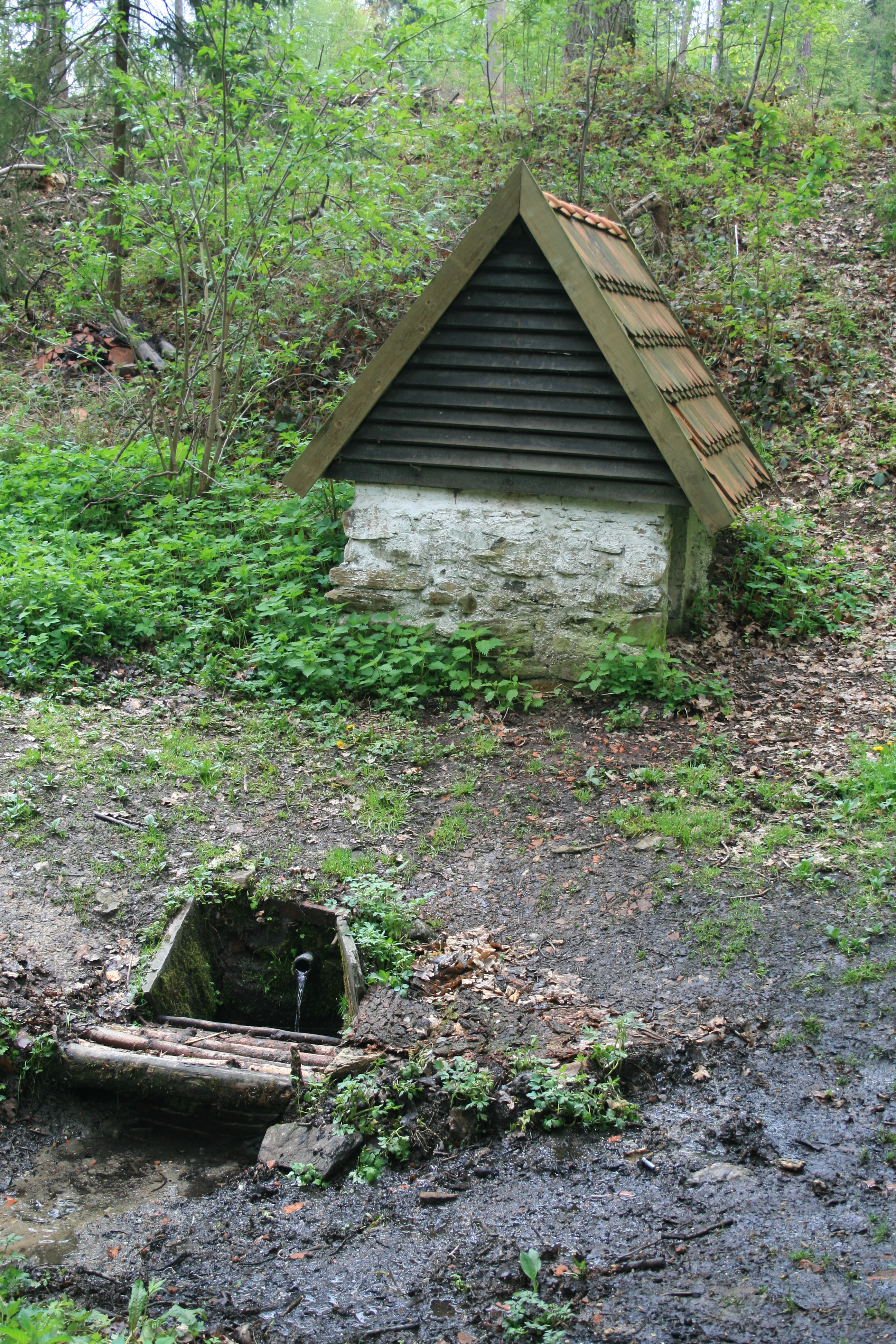 Studánka v roce 2010